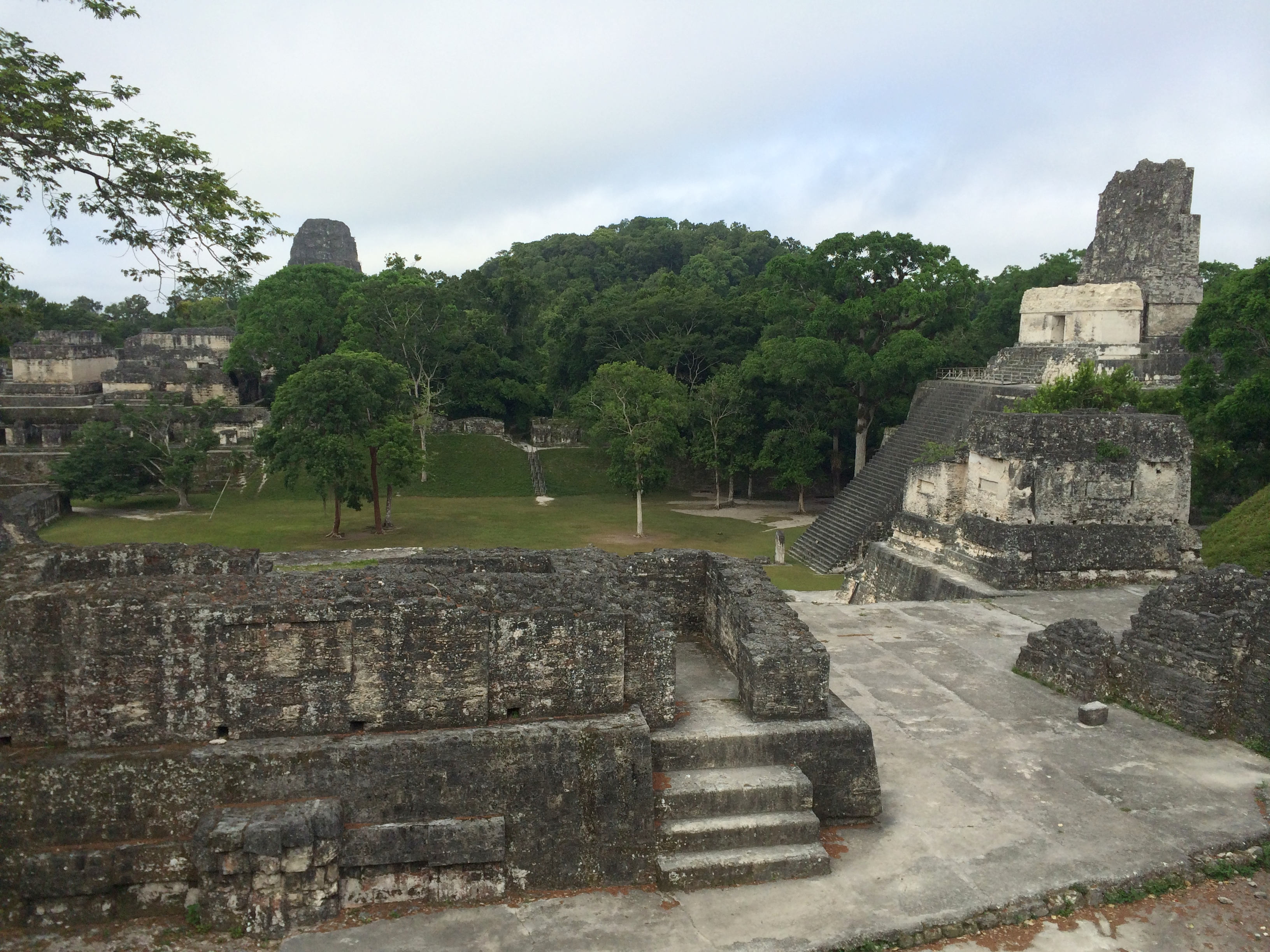 Гватемала